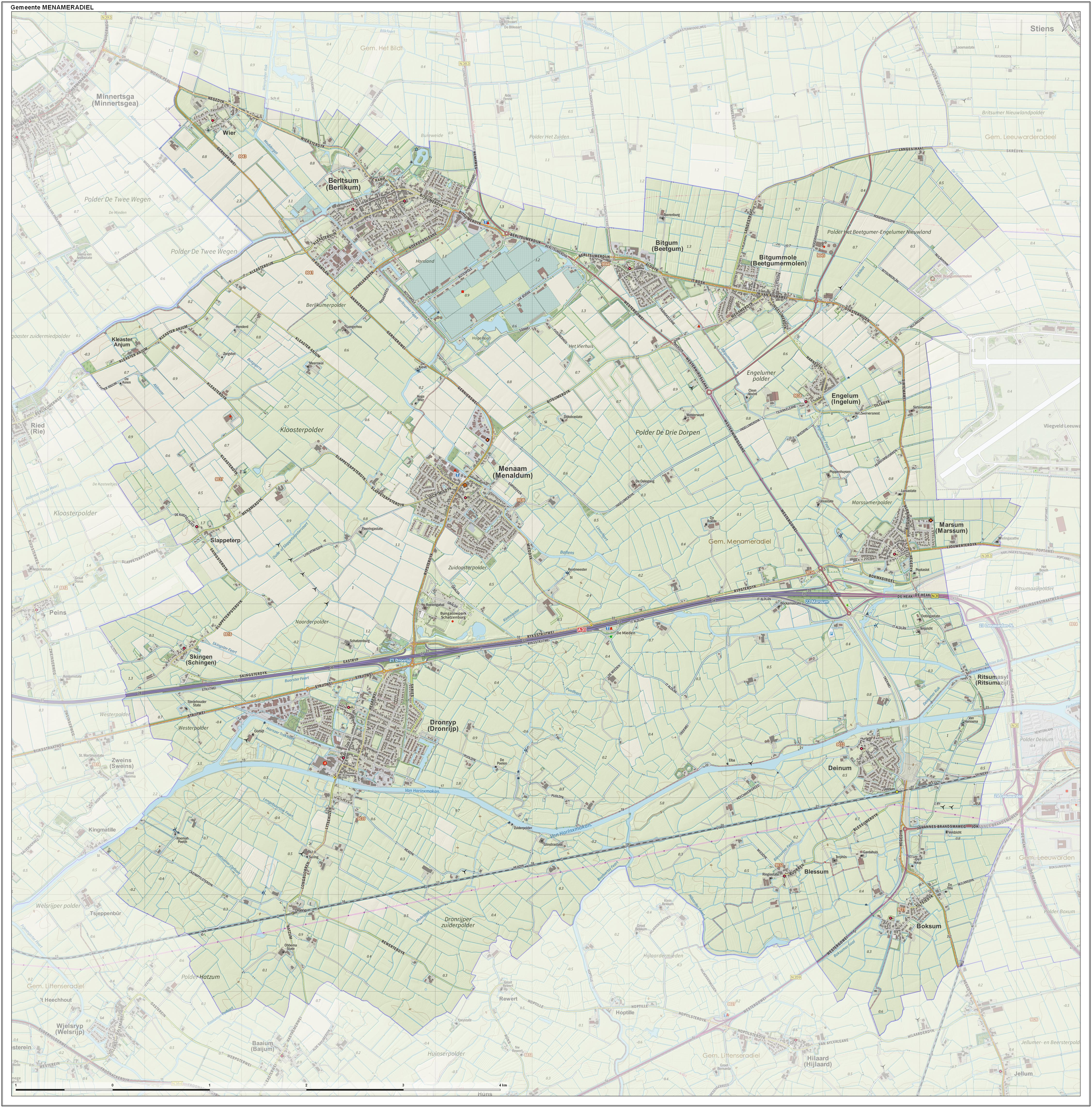 Topografische gemeentekaart. Resolutie: 300 pixels/km. Kaartbeeld samengesteld uit de open geodata van de Top10NL en Top25namen (Kadaster), Creative Commons-BY licentie. Gebouwvlakken uit open geodata BAG extract. Wegen uit de OpenStreetMap, OpenStreetMap community. Reliëfschaduw uit de Actuele Hoogtekaart AHN2. Samenstelling en kleurenschema: Jan-Willem van Aalst, met QGIS. Zie ook de Legenda.